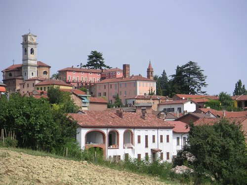 Panorama del comune di Castelletto Monferrato